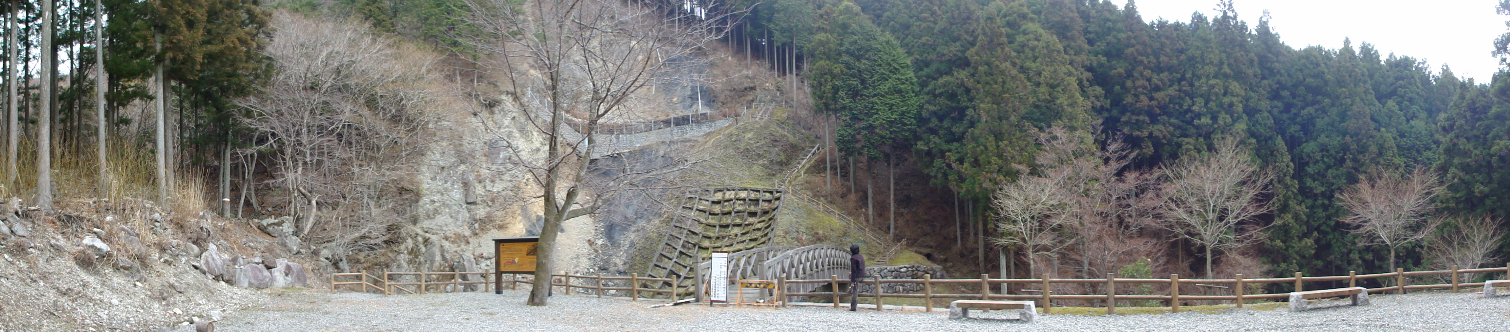 中央構造線 月出露頭